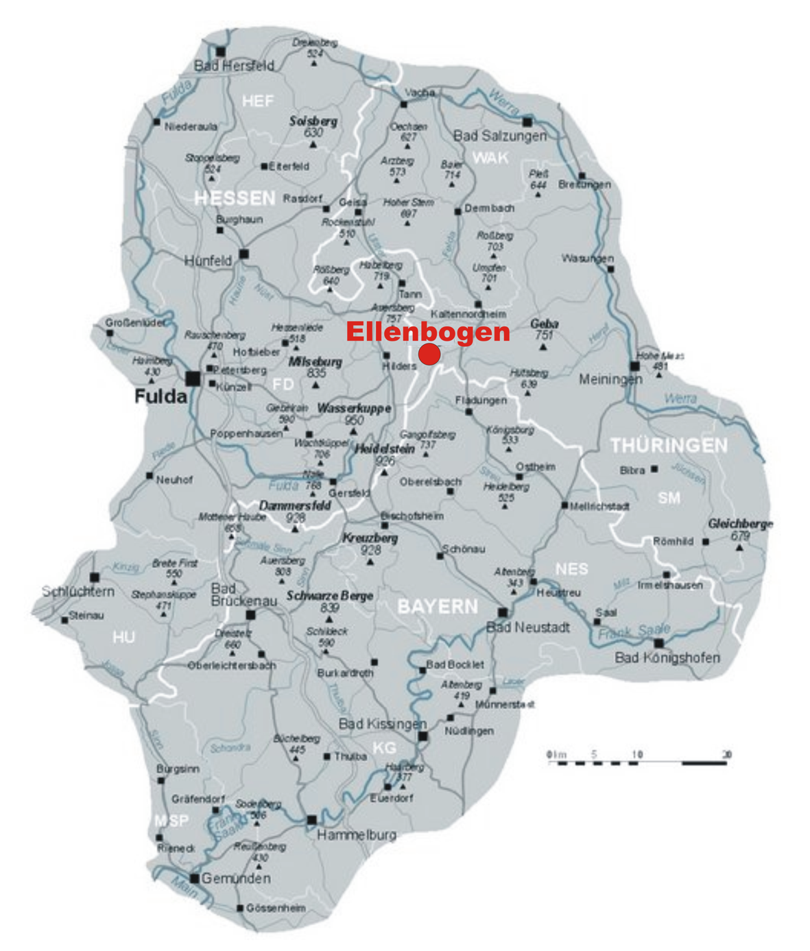 Karte: Lage Berg Ellenbogen in der Rhön - Kartengrundlage Mg-k., Ergänzung presse03 - GNU-FDL